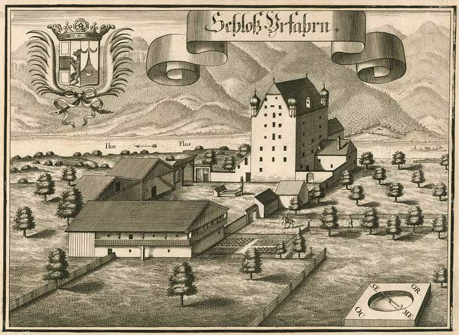 “Schloß Urfahrn” (bei Oberaudorf), aus: Beschreibung des Churfürsten- und Hertzogthumbs Ober- und Nidern Bayrn.